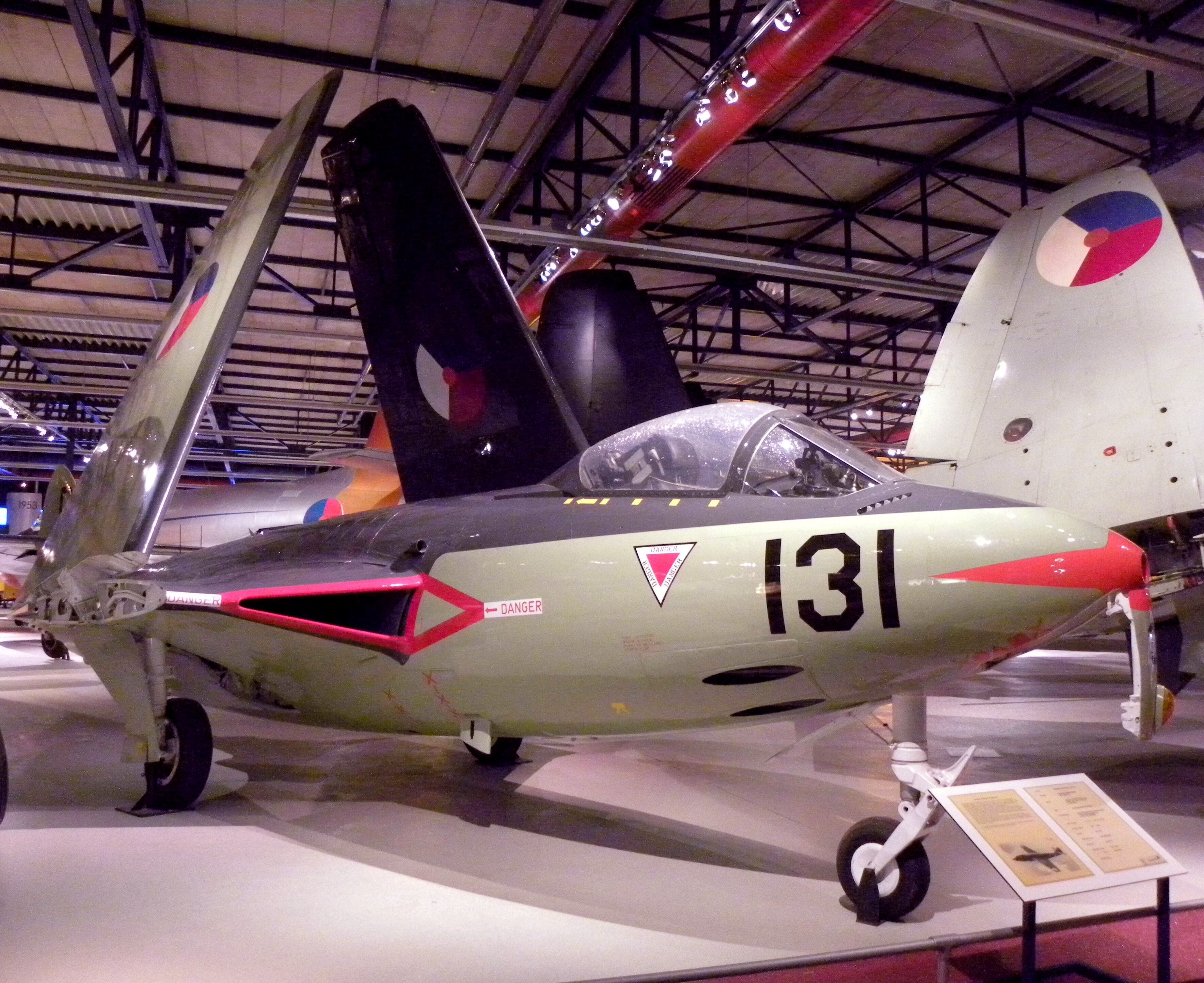 seen at militare luchtvaart museum Soesterberg